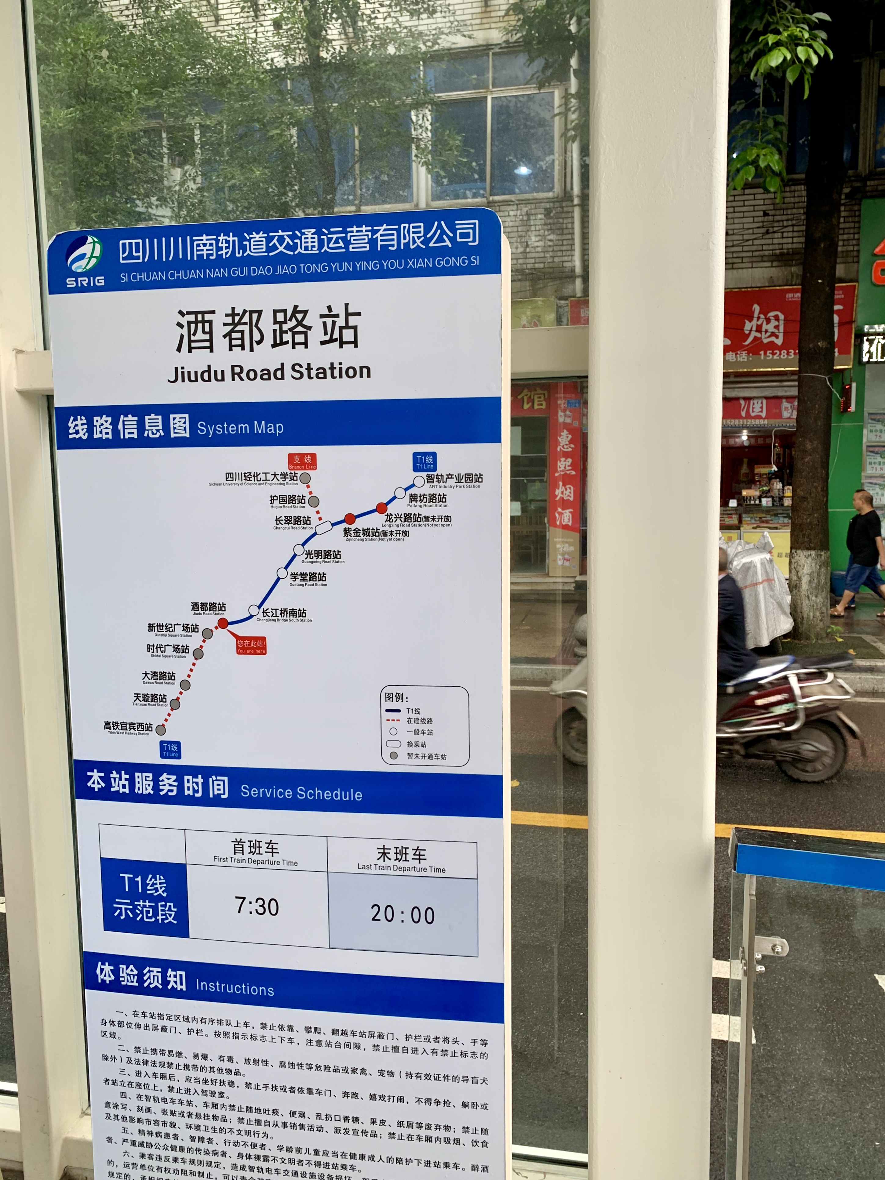 宜宾智轨T1线站台